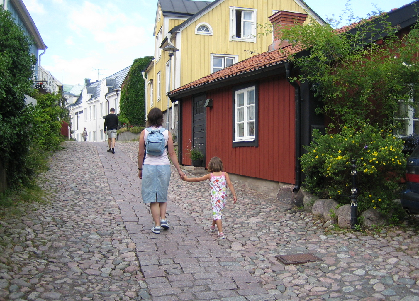 Besvärsgatan i Oskarshamn.